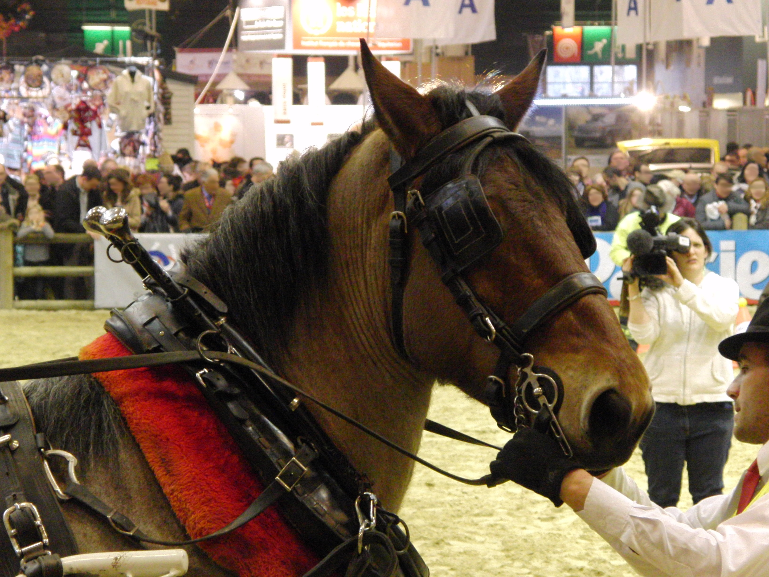 Tête d'un cheval auxois lors du concours Trait d'avenir attelage dans l'épreuve de maniabilité - Salon international de l'agriculture 2013, Paris, France